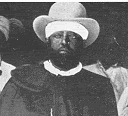 Gugsa Welle